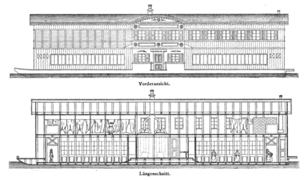 Darstellung eines Waschschiffs in Frankreich